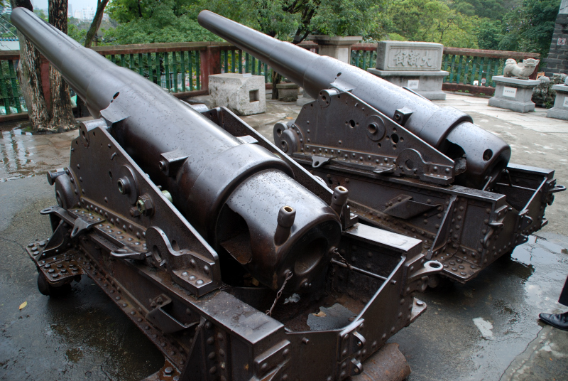 城防大炮